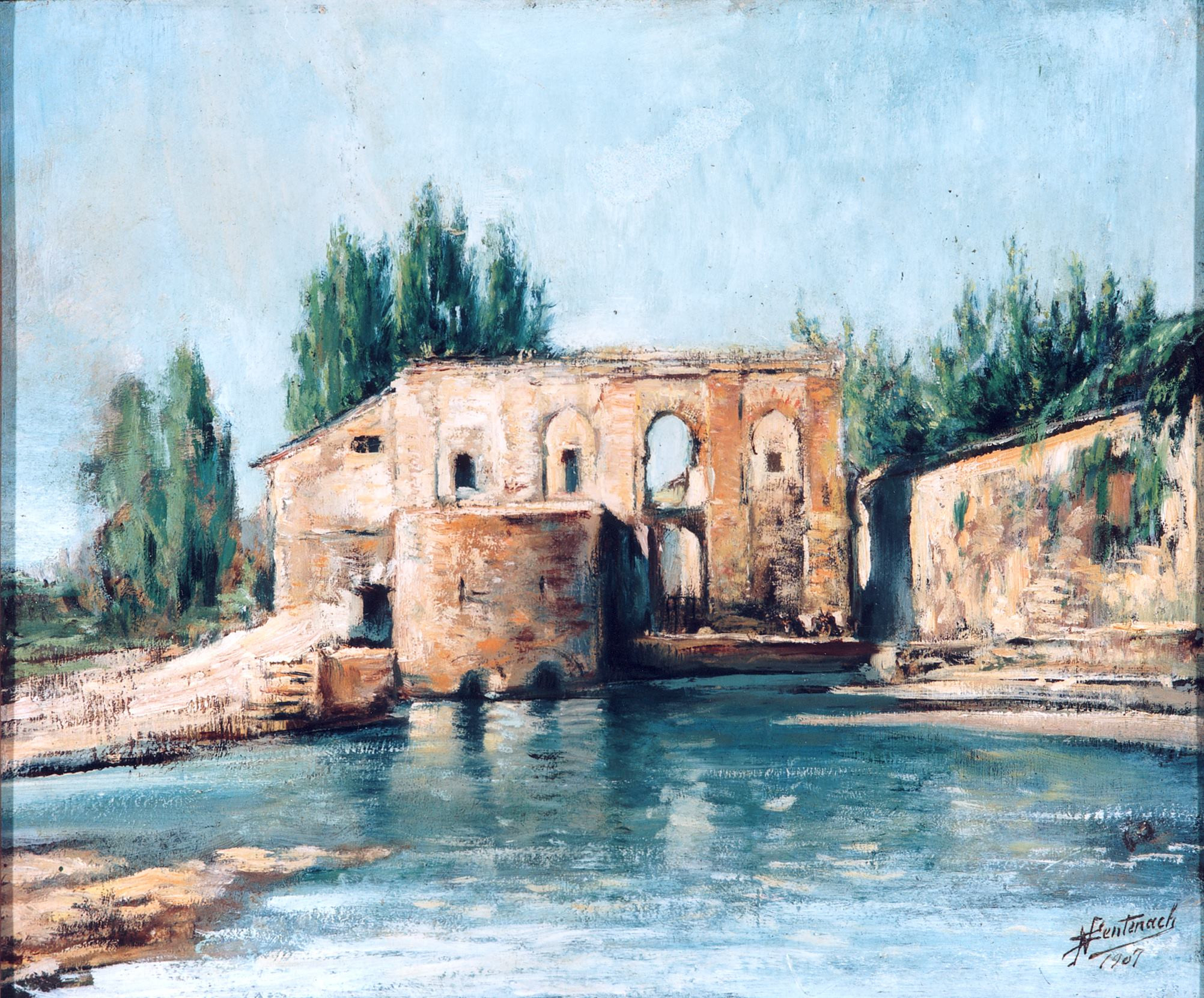 La obra representa el molino de la Albolafia de Córdoba, también conocido como Rueda de la Albolafia. Es un molino hidráulico que se encuentra en la orilla derecha del Río Guadalquivir, cerca del puente romano de la ciudad de Córdoba, y su función inicial fue la de proveer agua de riego de las huertas del Alcázar, aunque más tarde se convierte en molino harinero y batán.